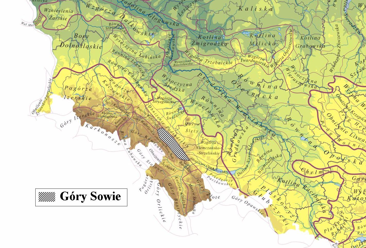 Eulengebirge